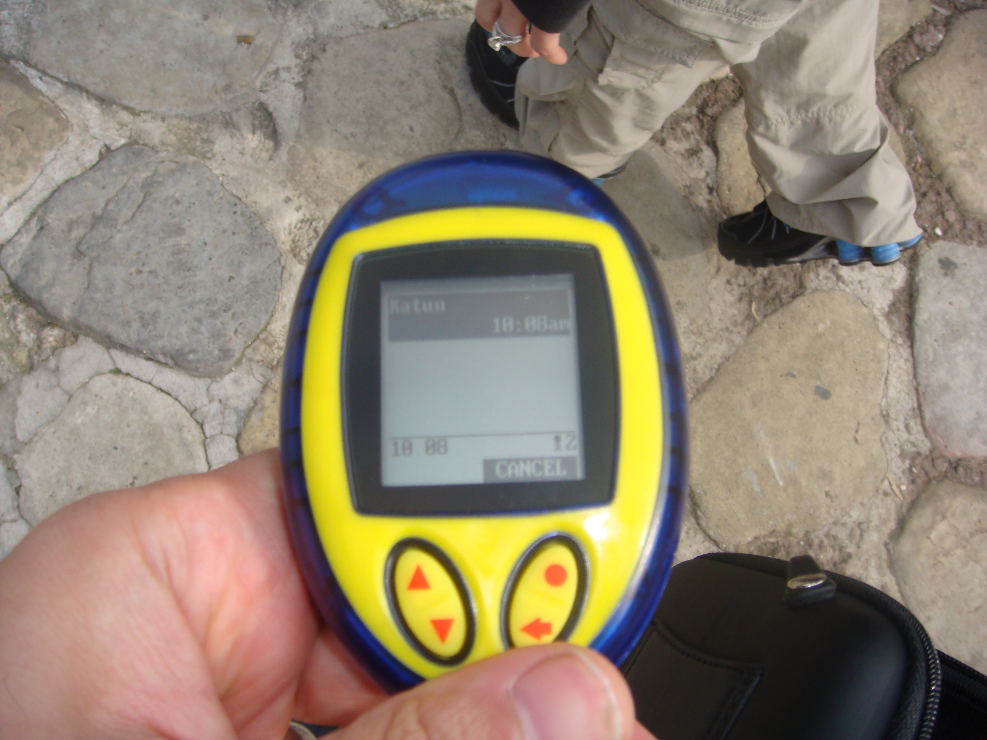 QBot at Mirabilandia